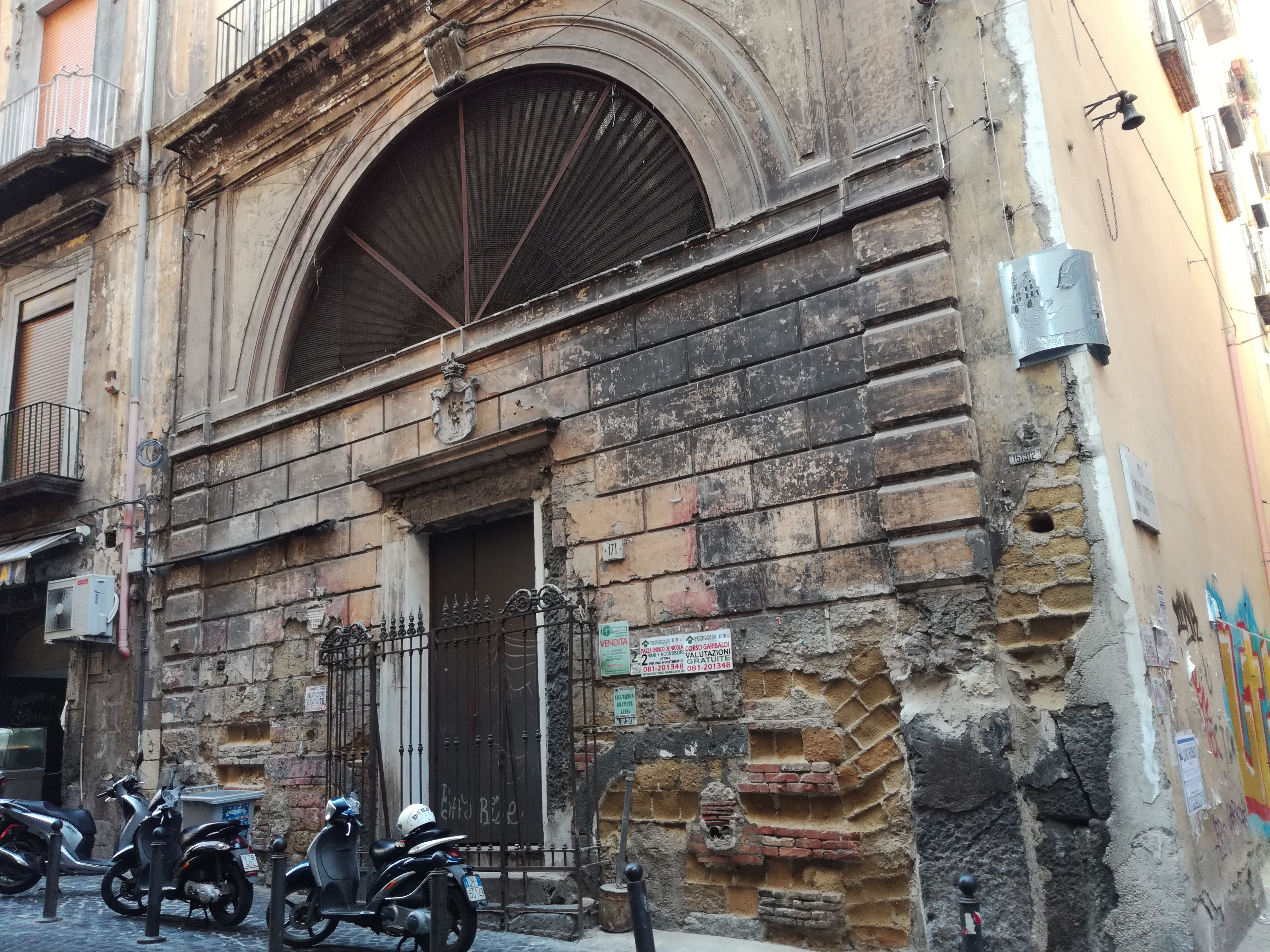 Chiesa di Sant'Andrea dei Cocchieri (Napoli)